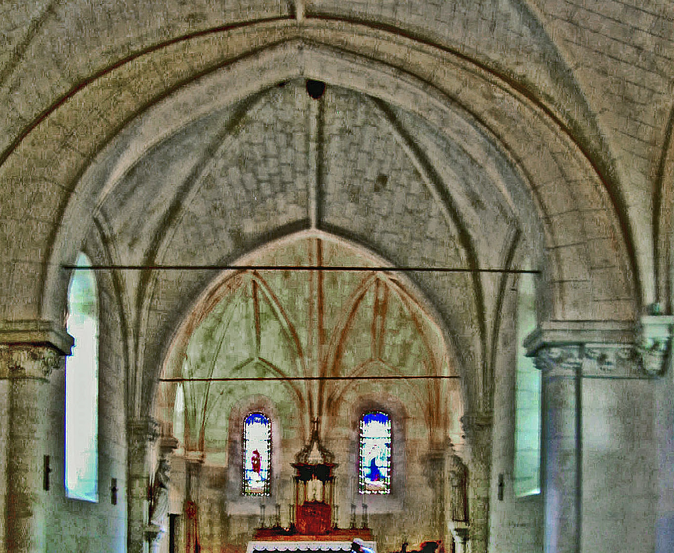 Église Saint-Martin-de-Vertou de Linières-Bouton, 11ème et 12ème siècle.